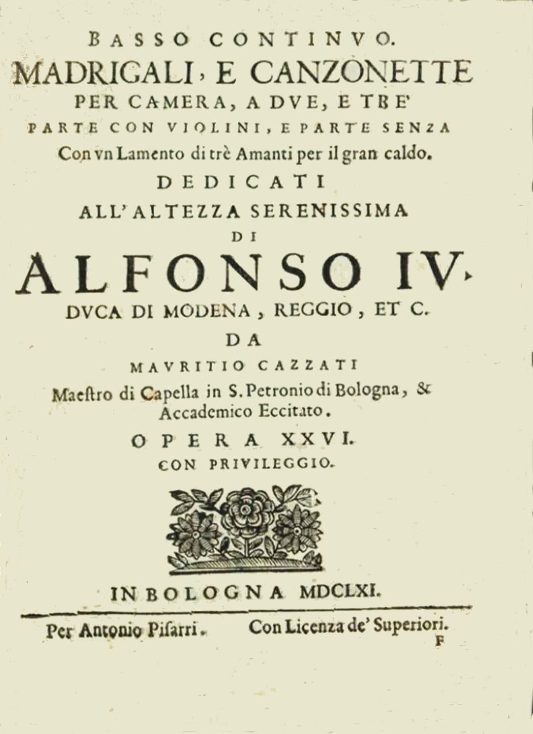 Page de titre des Madrigali e Canzonette per camera de Maurizio Cazzati (Bologne, 1661)